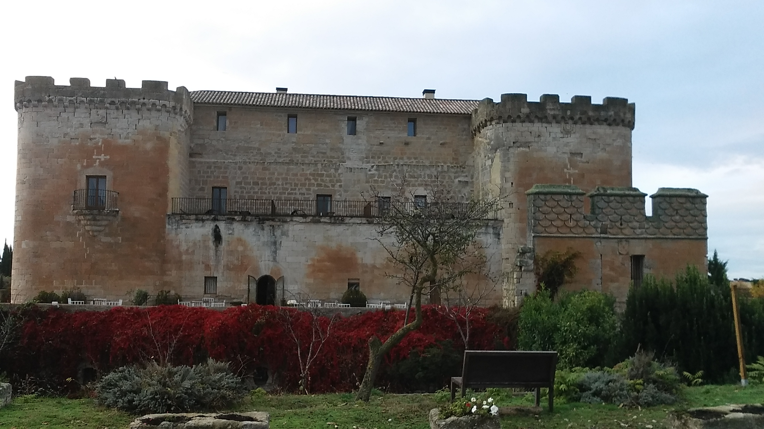 castillo bien amor entrada